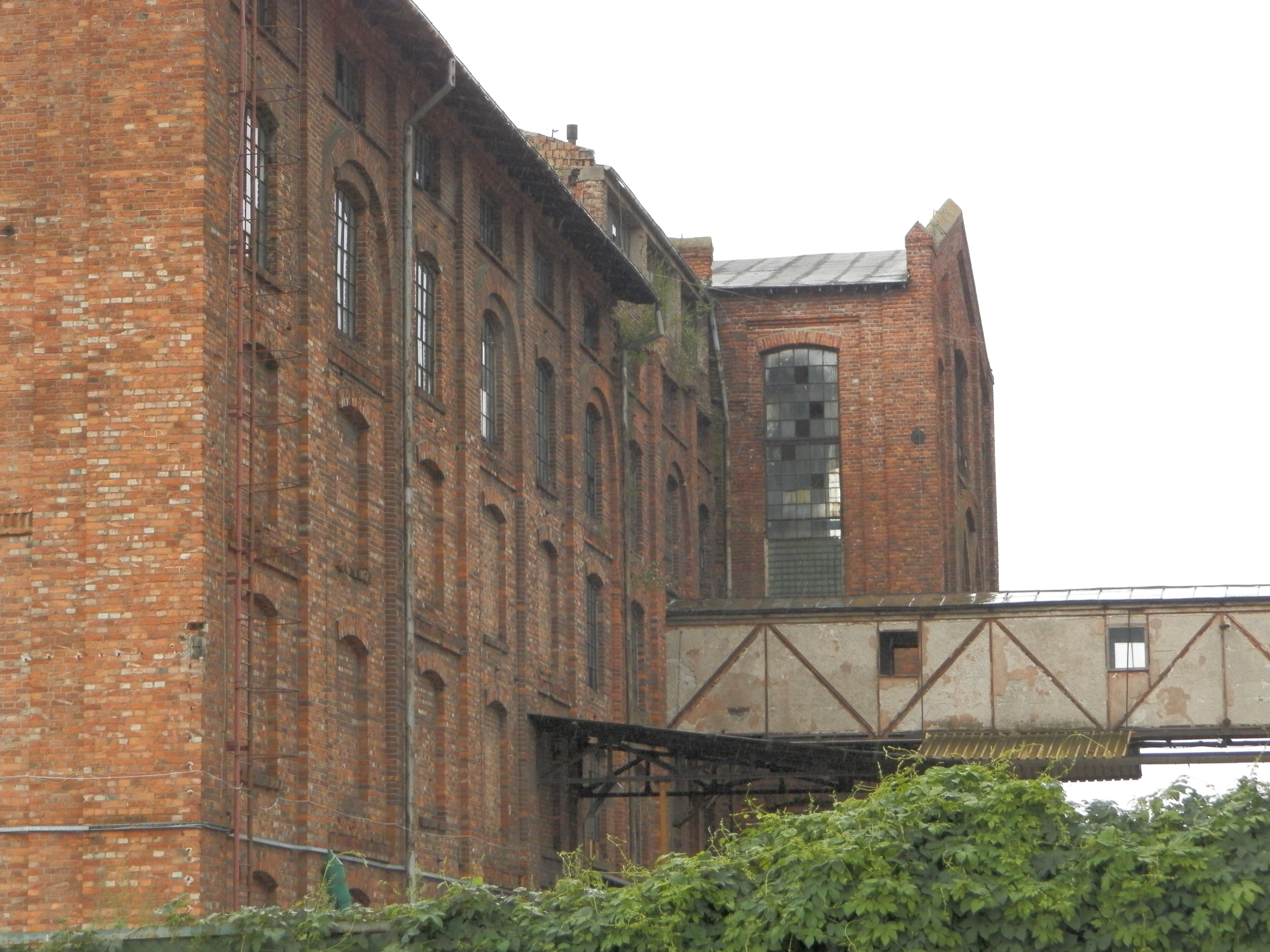 Sokołów Podlaski, zespół cukrowni ELŻBIETÓW, 1846, 1904-1906